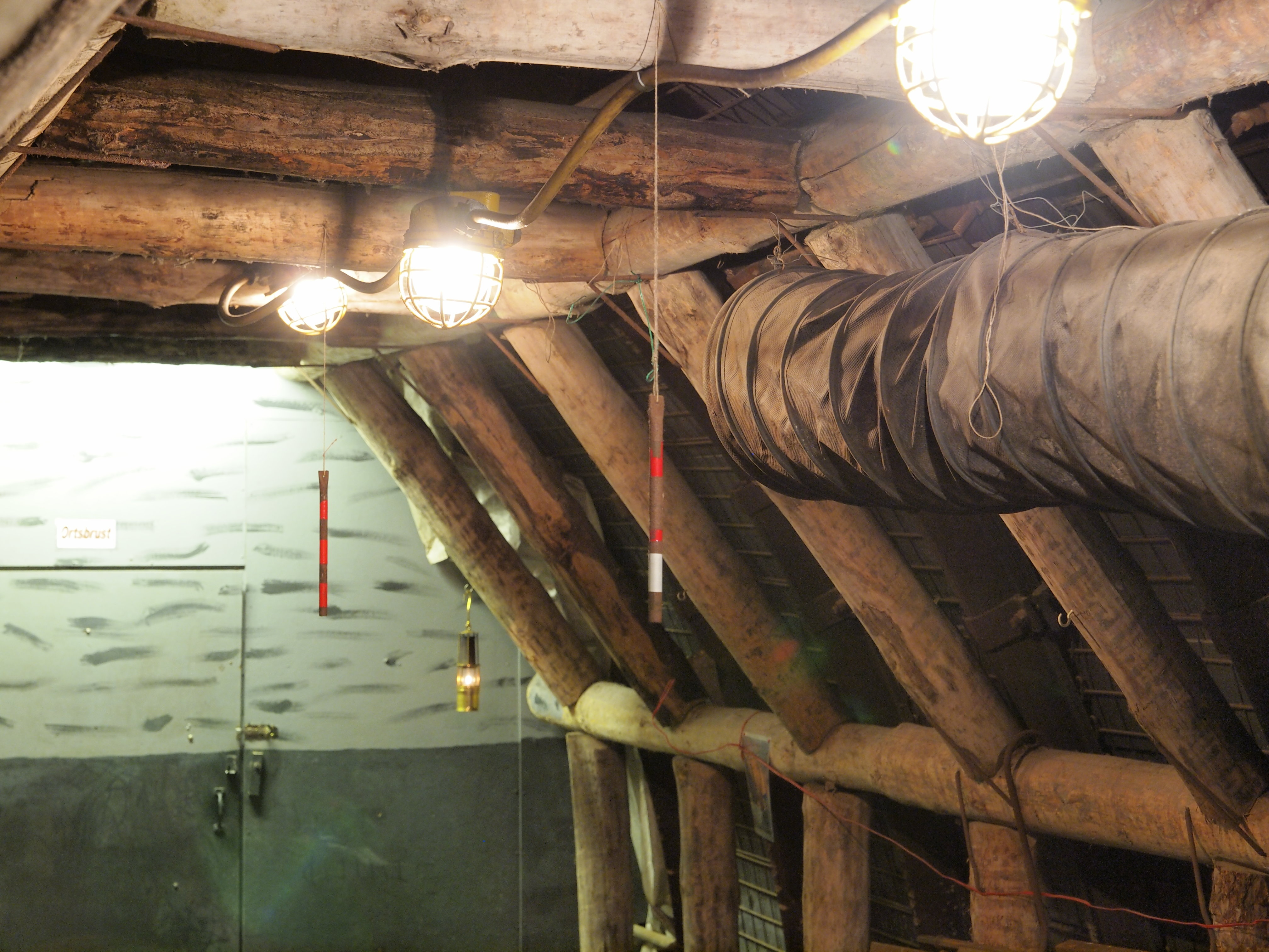 Gelsenkirchen, Nordsternpark, Bergbaustollen, gehängte Stunde - vom First herabhängende Markierungsstangen zur Richtungsbestimmung beim weiteren Auffahren des Stollens gehängte Stunde)